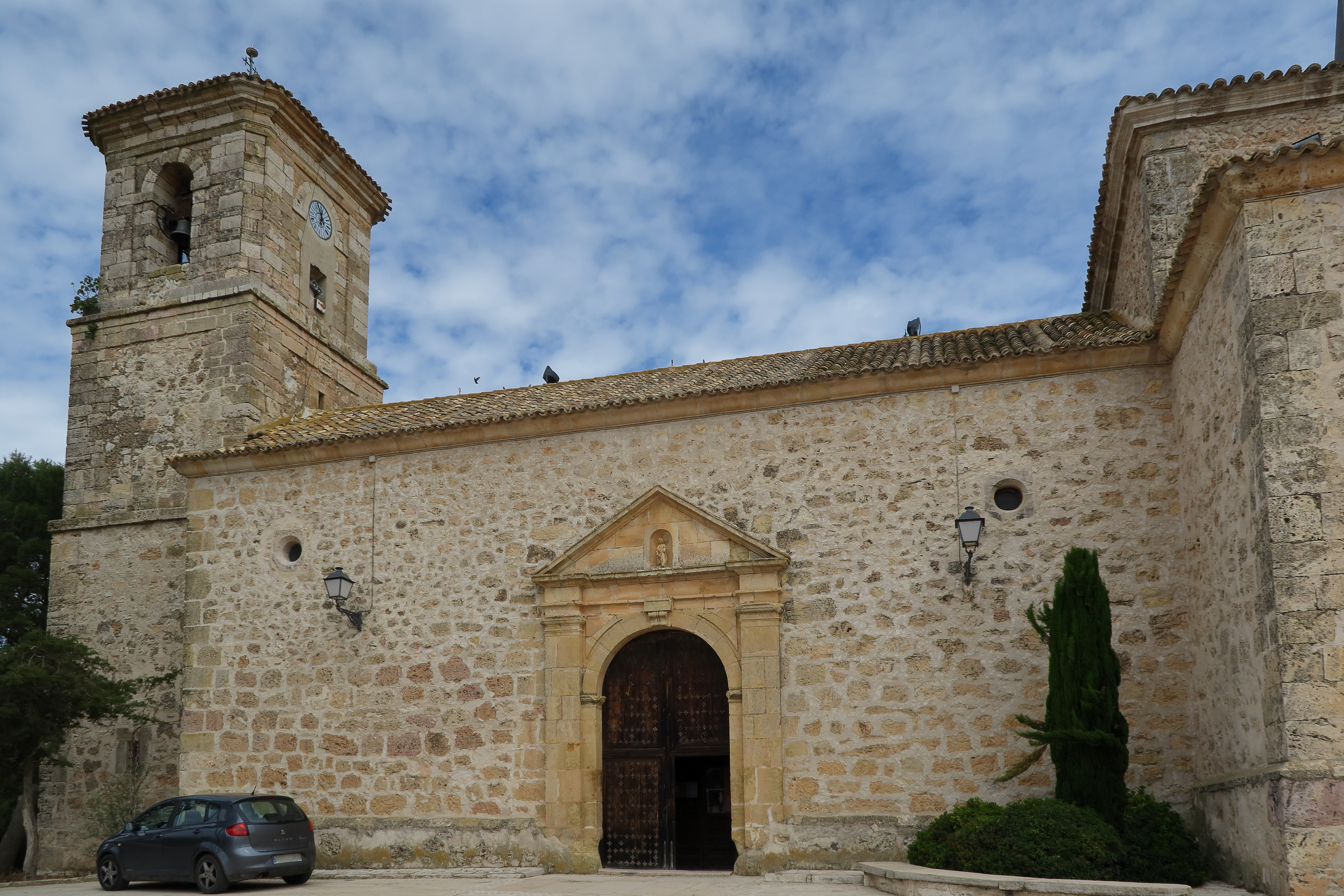 Villarrubio, Iglesia parroquial, fachada principal